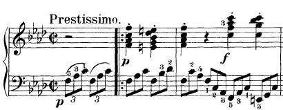 Compassos iniciais do quarto movimento da Sonata Op. 2 n. 1 de Beethoven